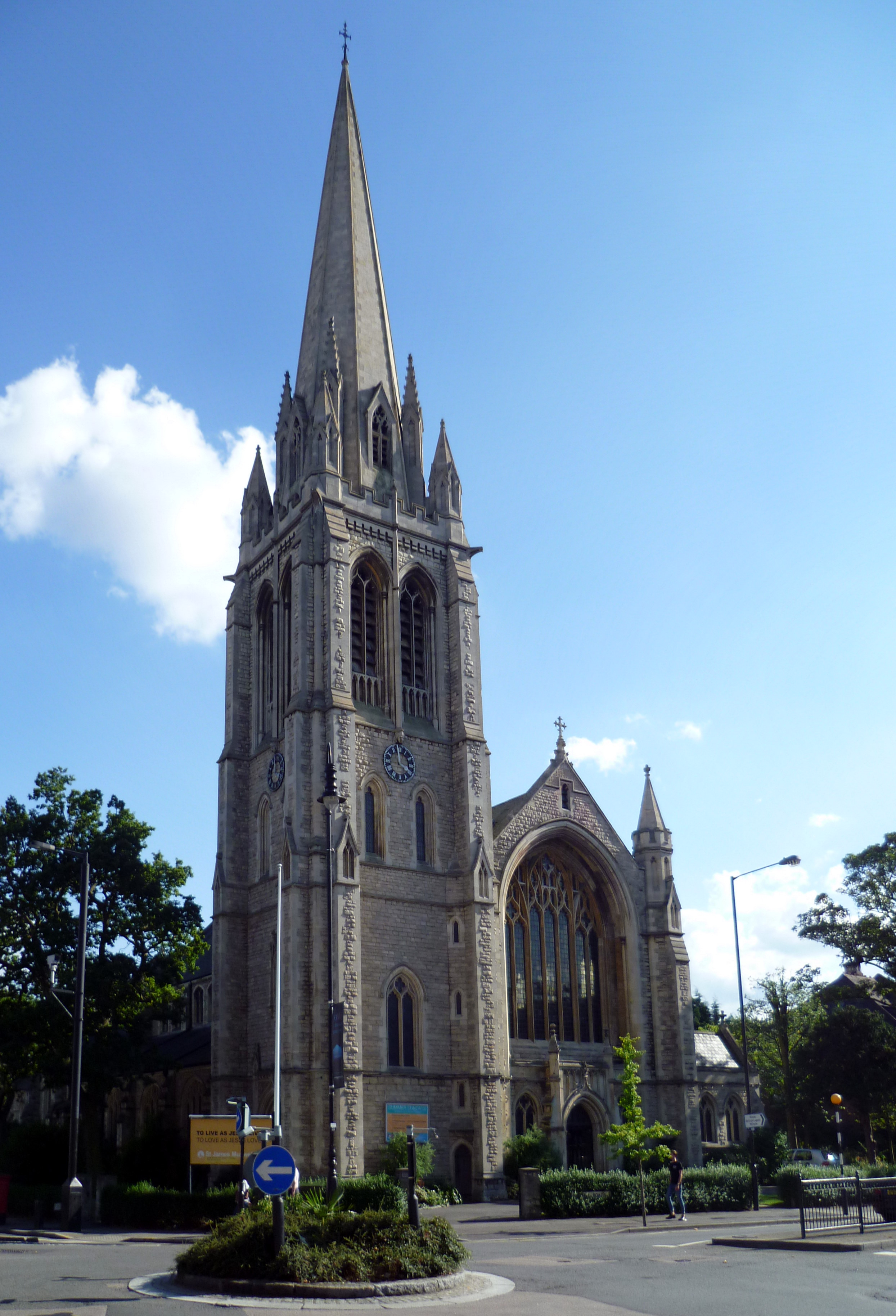 Architect - John Samuel Alder